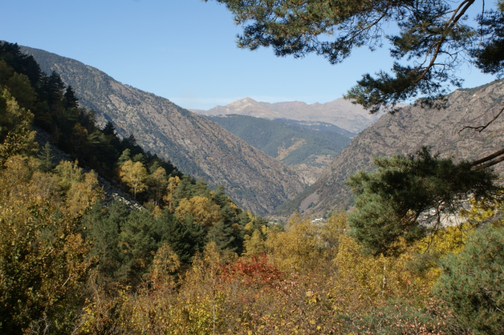 Vall del Madriu-Perafita-Claror This is a a photo of a natural area in Andorra with id: AD-VMPC